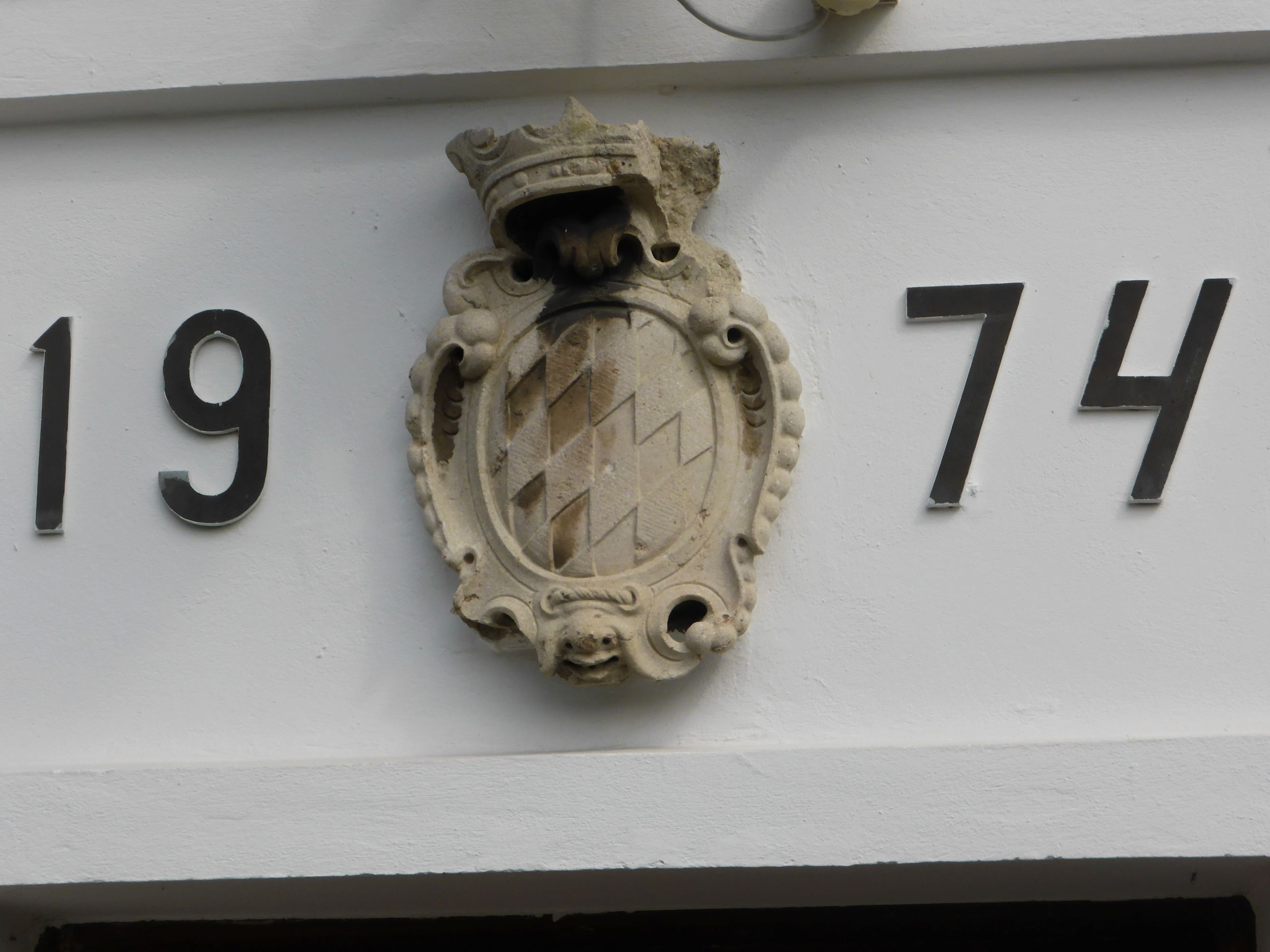 Gesamtanlage, Ehemaliges Schloss Radeck mit Schlosskapelle